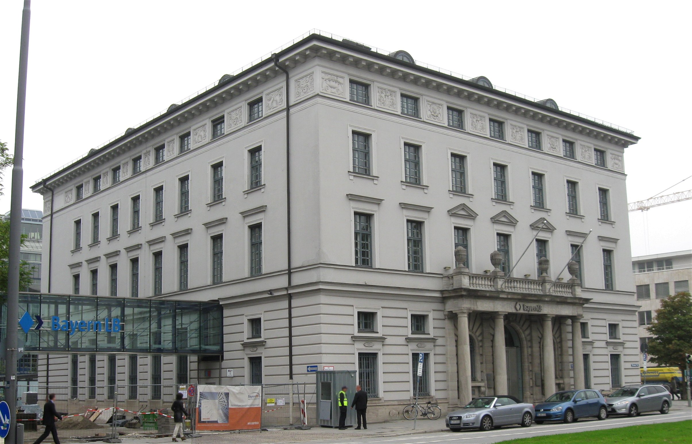 Brienner Straße 16; Disconto-Gesellschaft, jetzt Bayerische Landesbank (Altbau), palastartiger neuklassizistischer Bau, 1922–23 von Max Littmann.